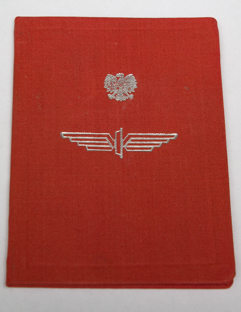 Okładka legitymacji odznaki "Przodujący Kolejarz"